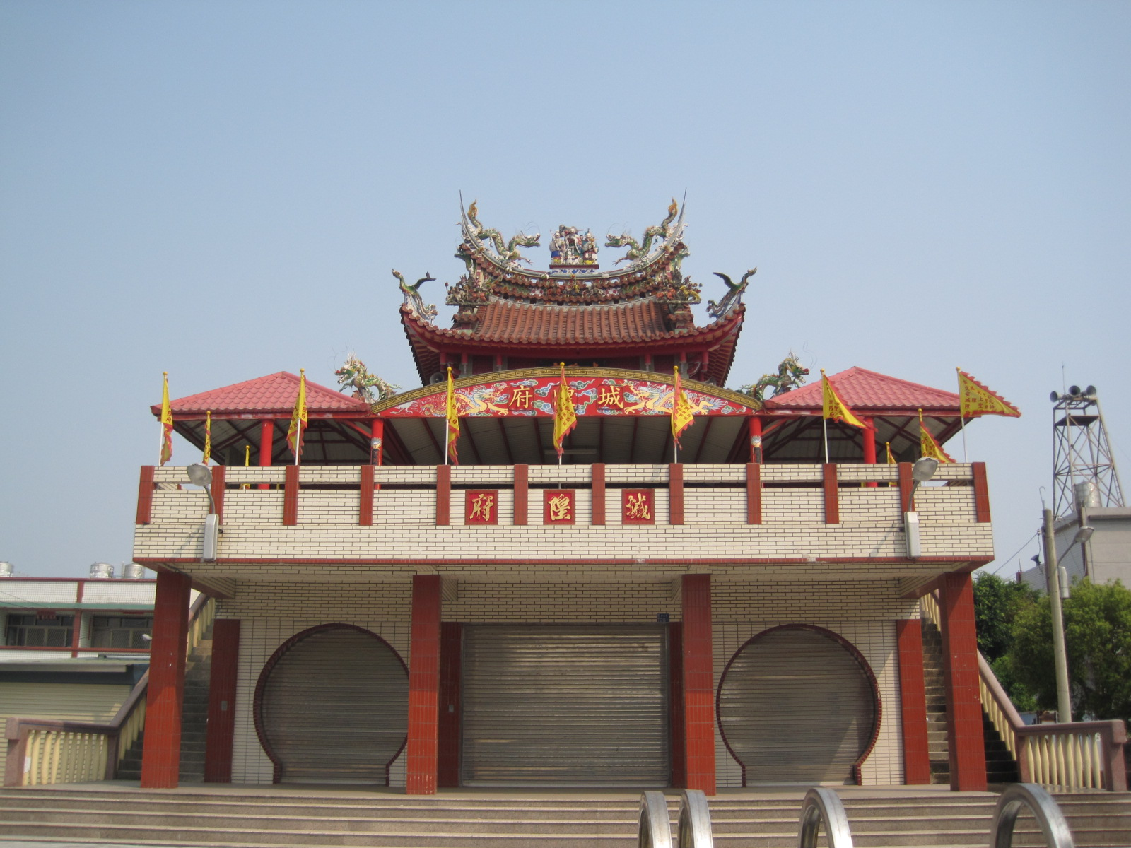 高雄彌陀城隍府